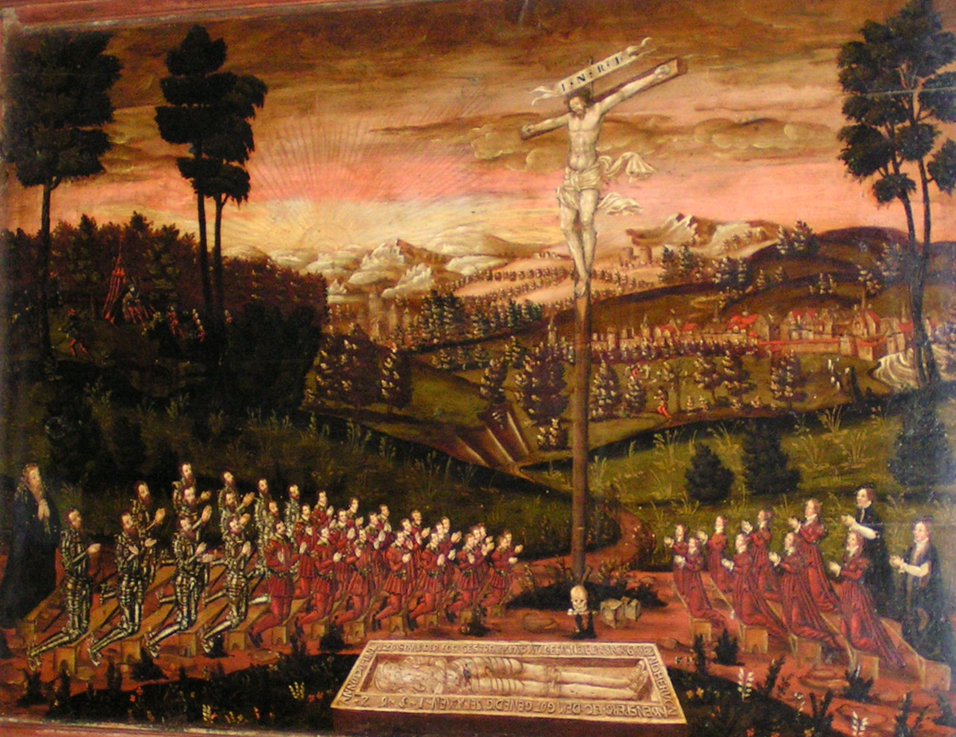 Mittelteil des im Aventinus-Museum Abensberg (Niederbayern) ausgestellten Babotriptychons. Es zeigt links Graf Babo mit seinen 32 Söhnen und rechts seine 2 Frauen und 8 Töchter . Graf Babo war von 975 - 980 Burggraf zu Regensburg